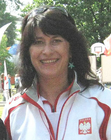 Mirosława Sagun-Lewandowska